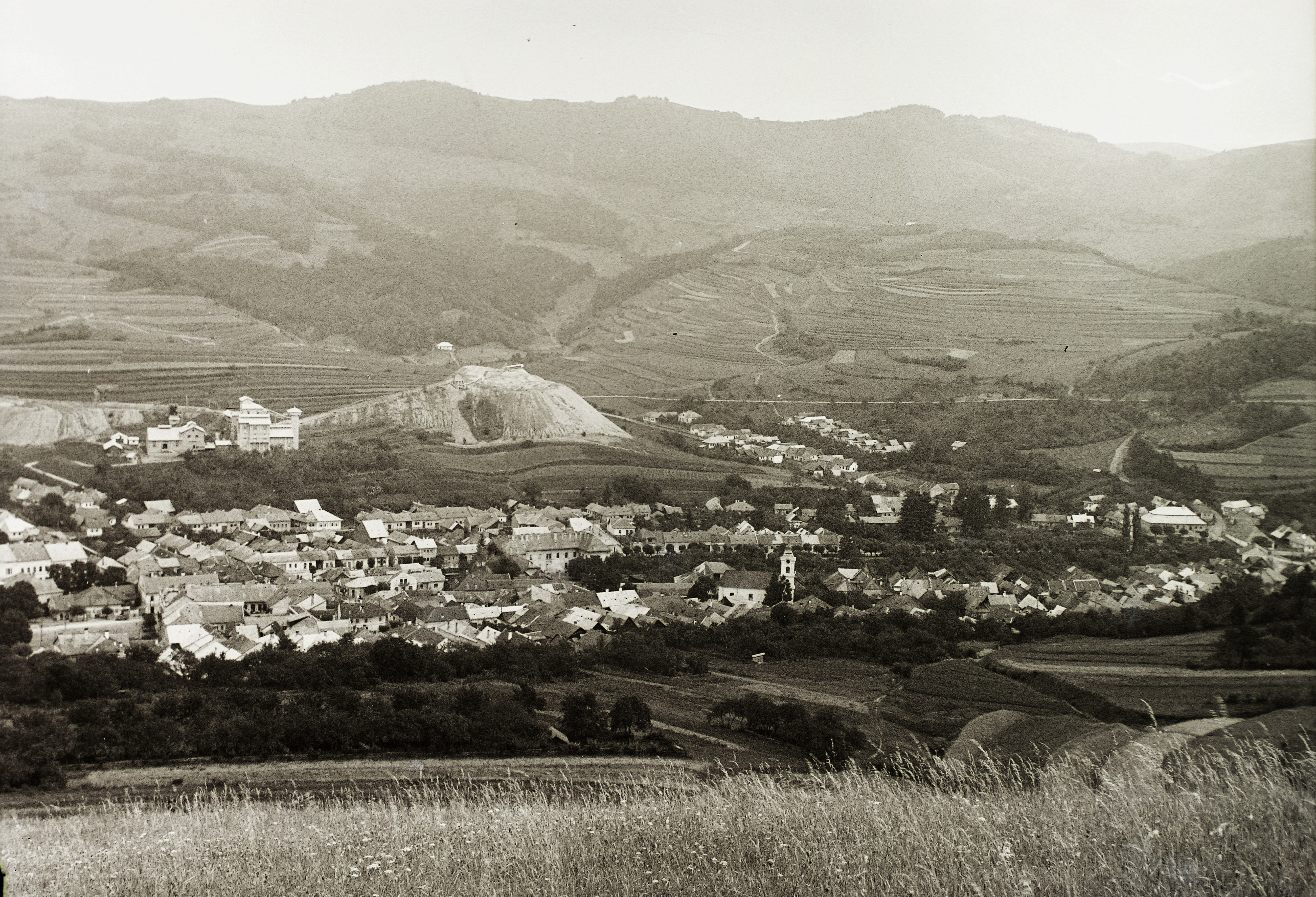 a város látképe, távolabb az azbeszt feldolgozó üzem és a bánya. Location: Slovakia, Dobšiná Tags: Czechoslovakia, picture Title: a város látképe, távolabb az azbeszt feldolgozó üzem és a bánya.